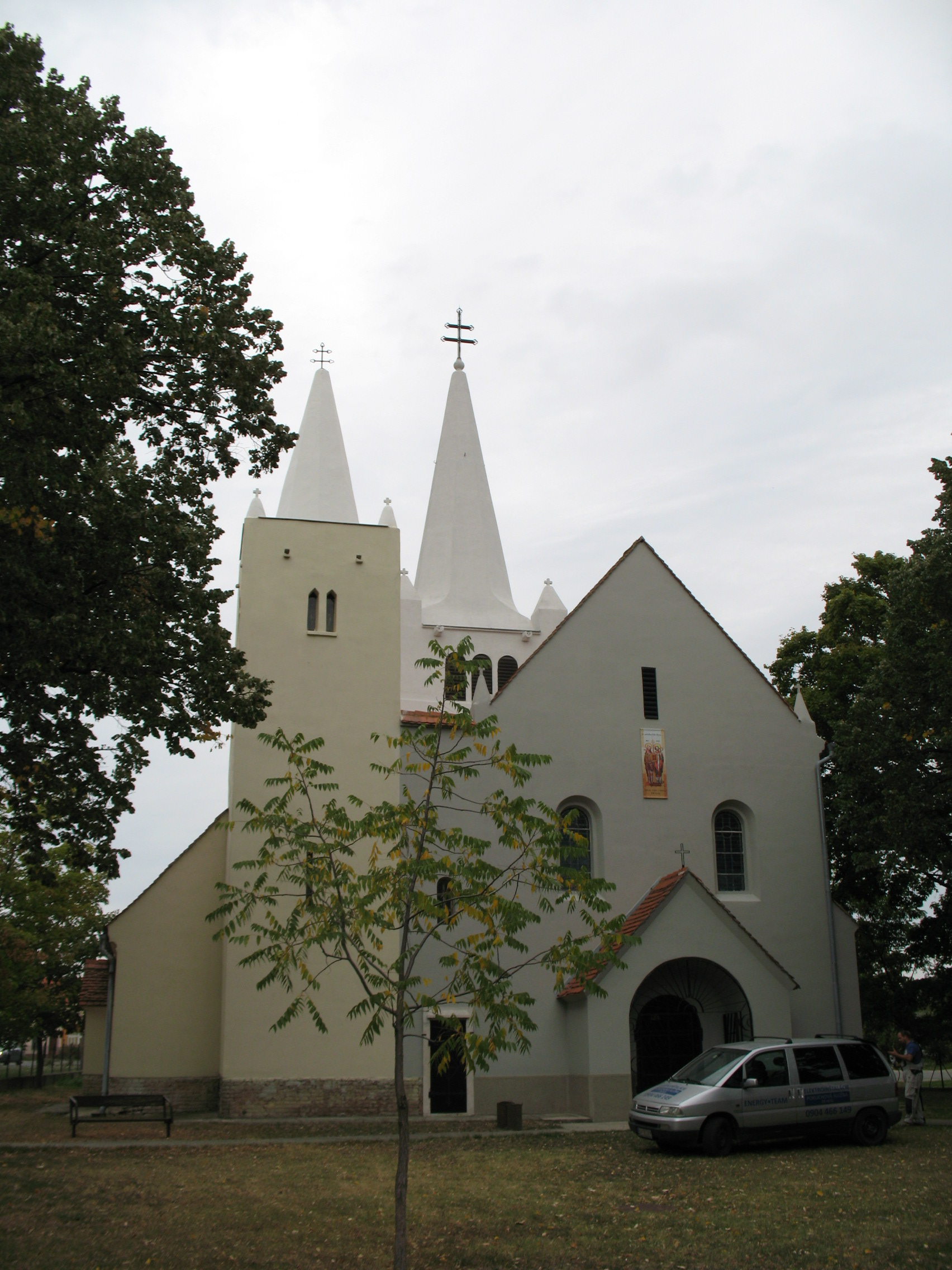 Hidas